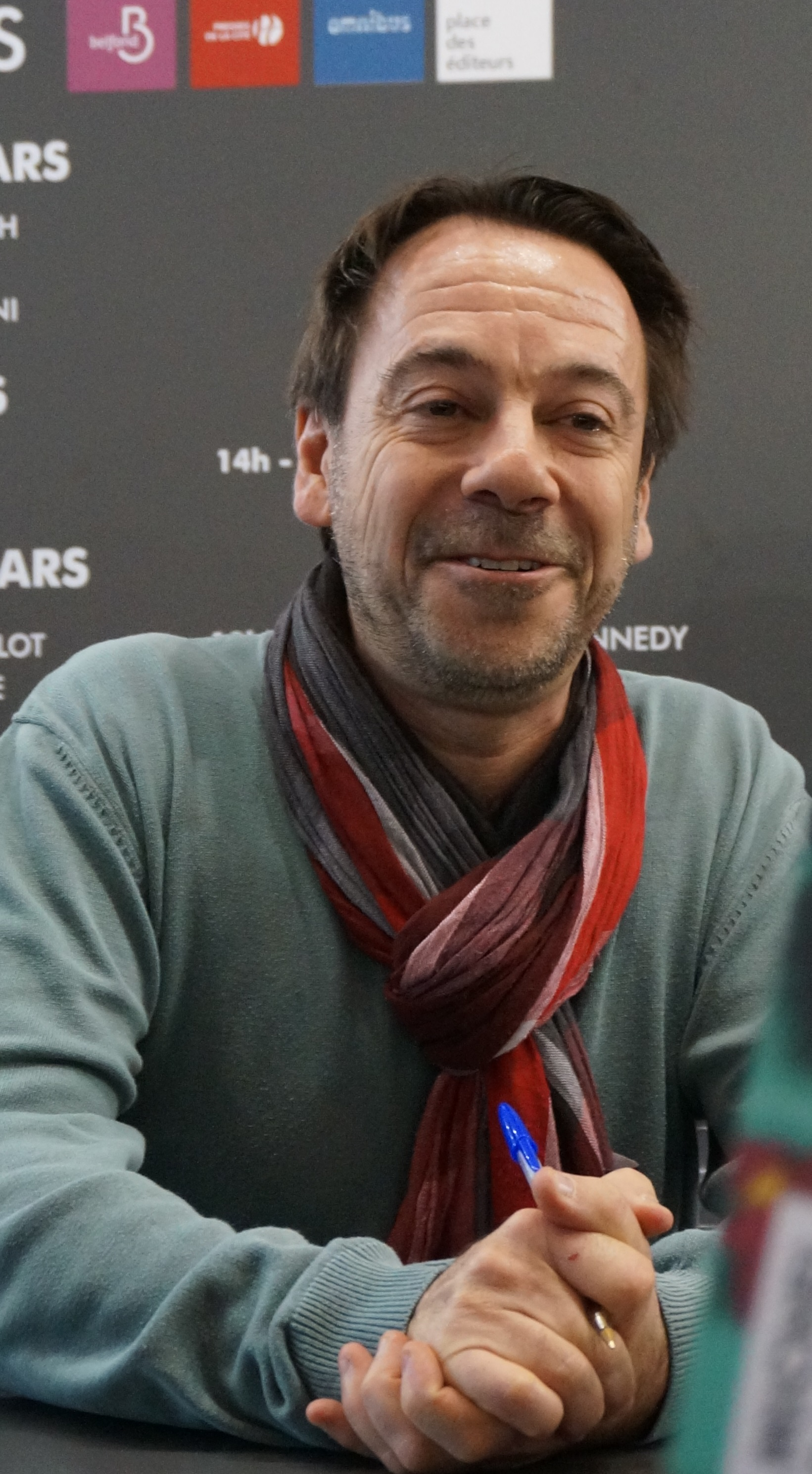 lors du salon du livre de 2015.